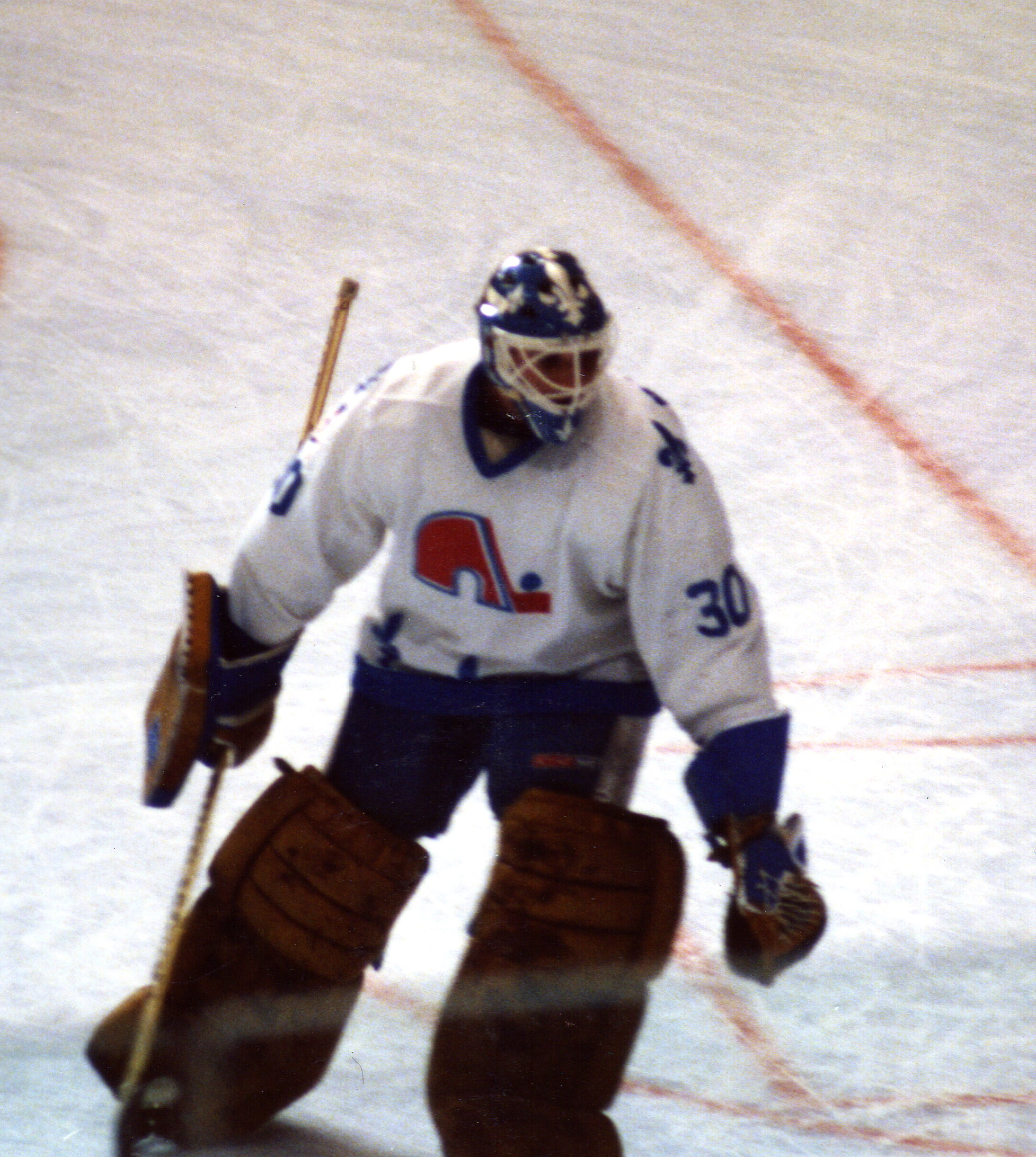 Le gardien Clint Malarchuk des Nordiques de Québec en 1986 (photo recadrée)